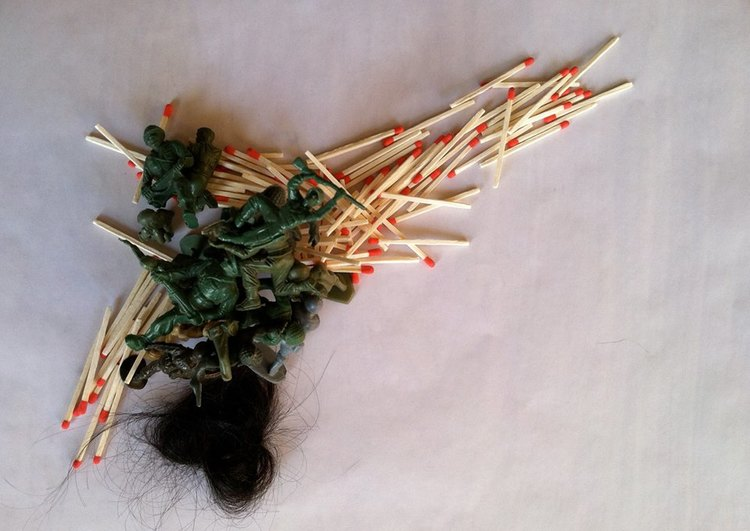 sculpture